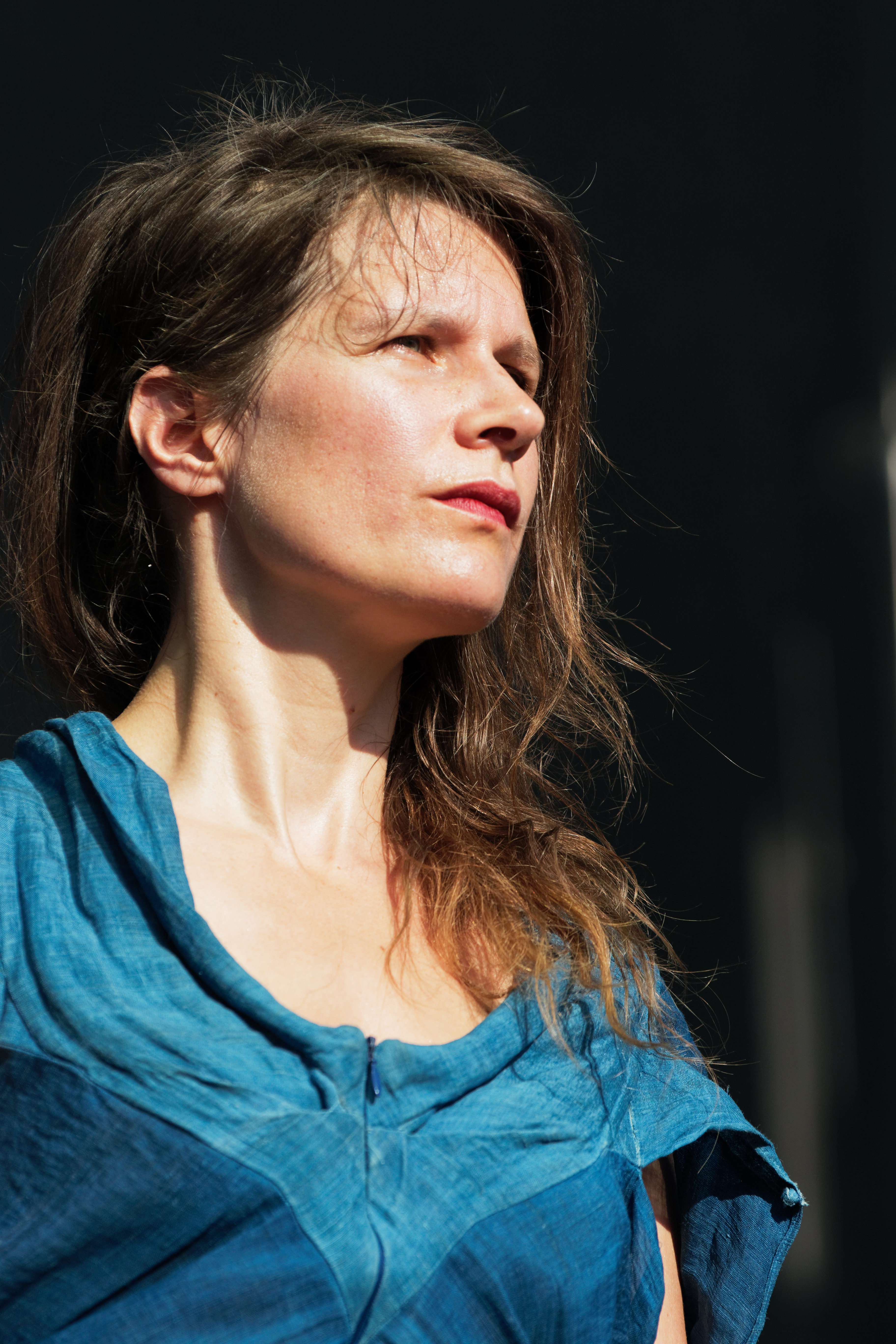 Camille en concert sur la scène Landaoudec lors du festival du Bout du Monde 2018 à Crozon dans le Finistère (France).